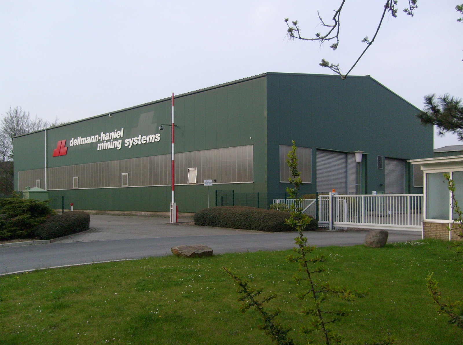 Deilmann-Haniel in Dortmund-Kurl, Werkhalle mining systems